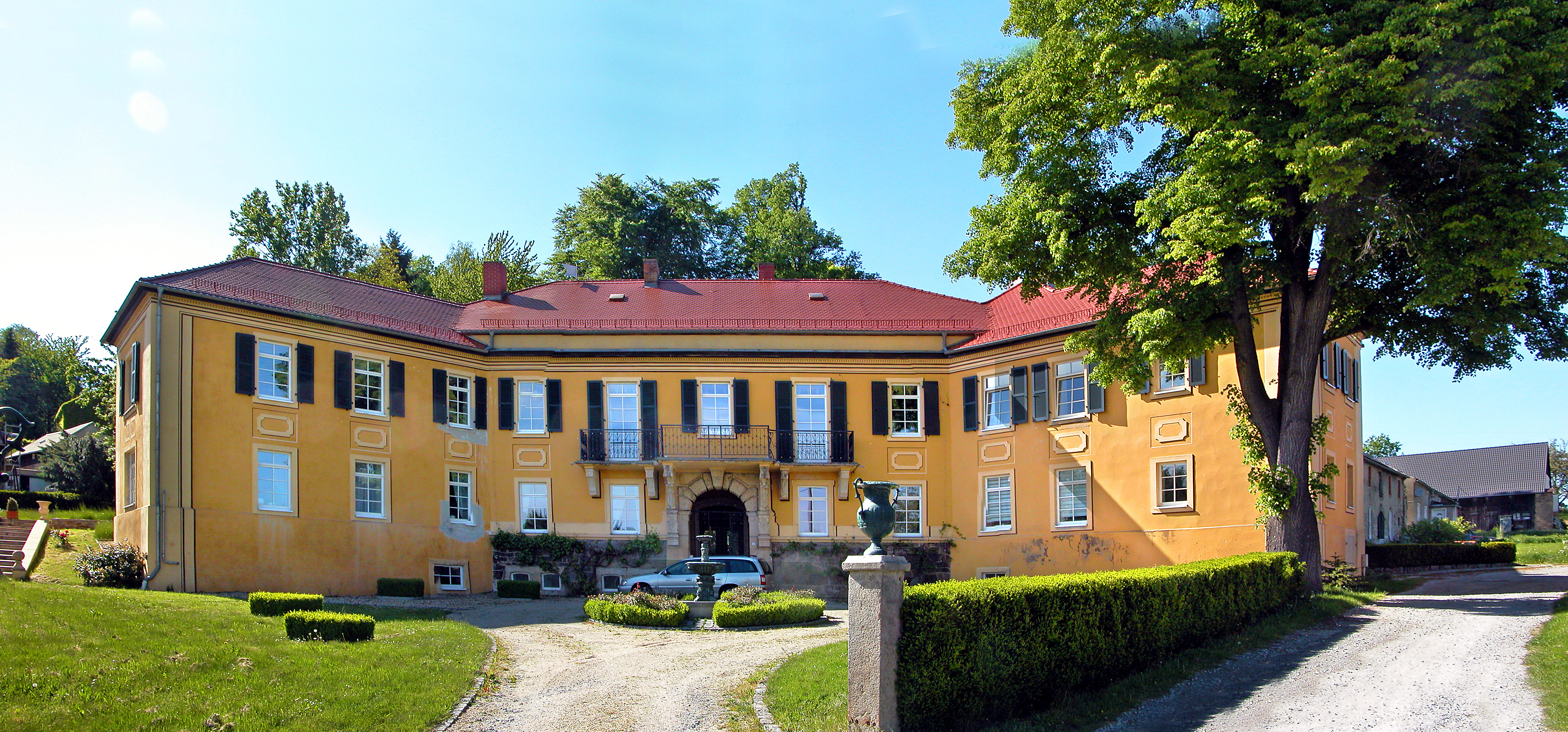 15.05.2015 01877 Pohla ( Demitz-Thumitz): Schloß Pohla, Schönbrunner Straße 9. (GMP: 51.164753,14.220319) Eingangsseite [DSCN5752+5753+7554.JPG]20150515400MDR.JPG(c)Blobelt